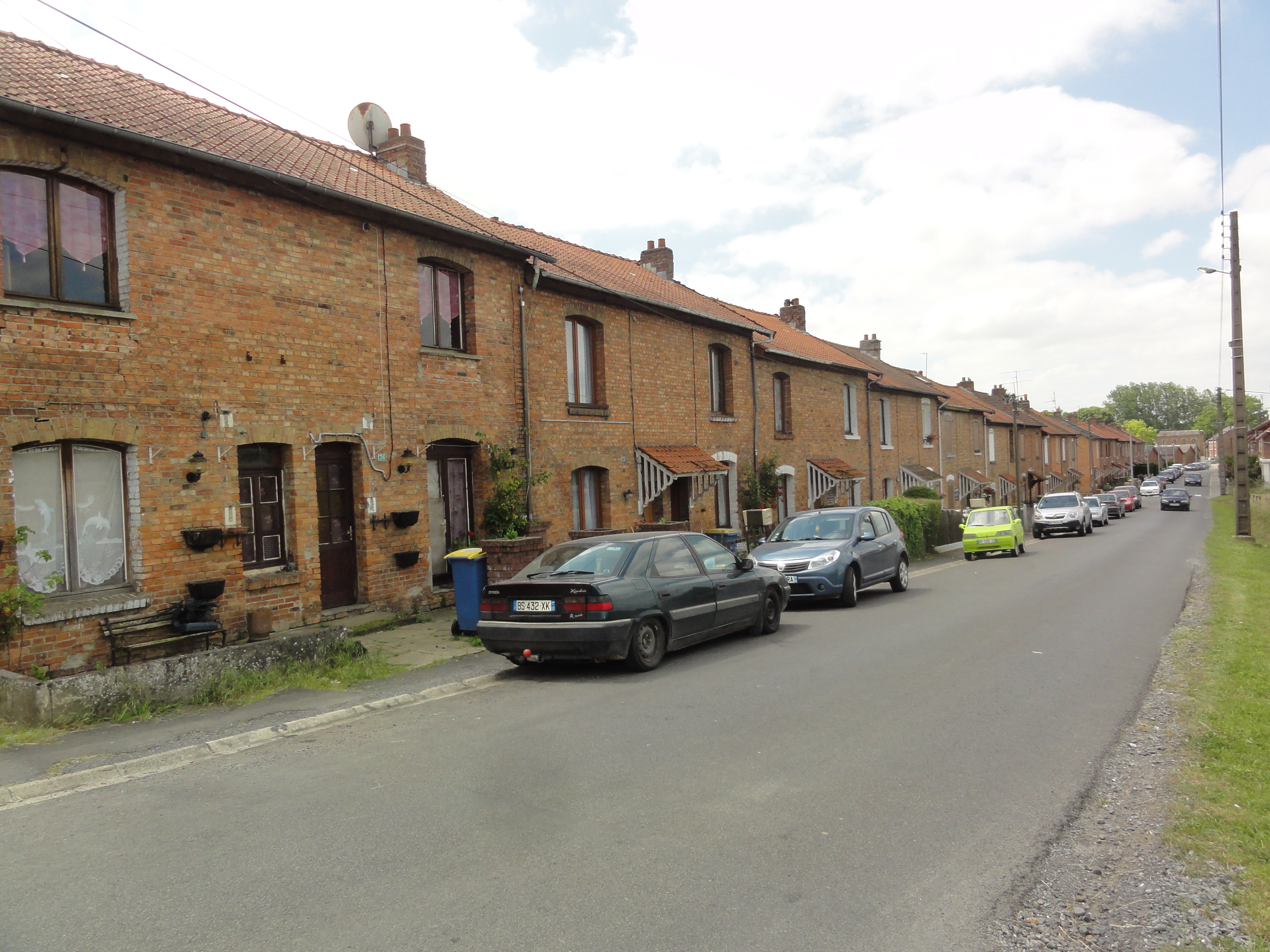 Effry (Aisne) cité ouvrière